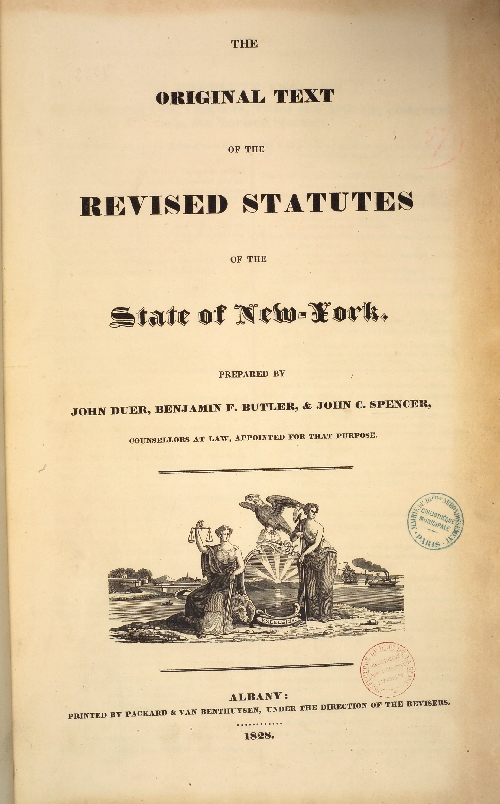 Fait partie du fonds étranger de la Bibliothèque de l'Hôtel de Ville